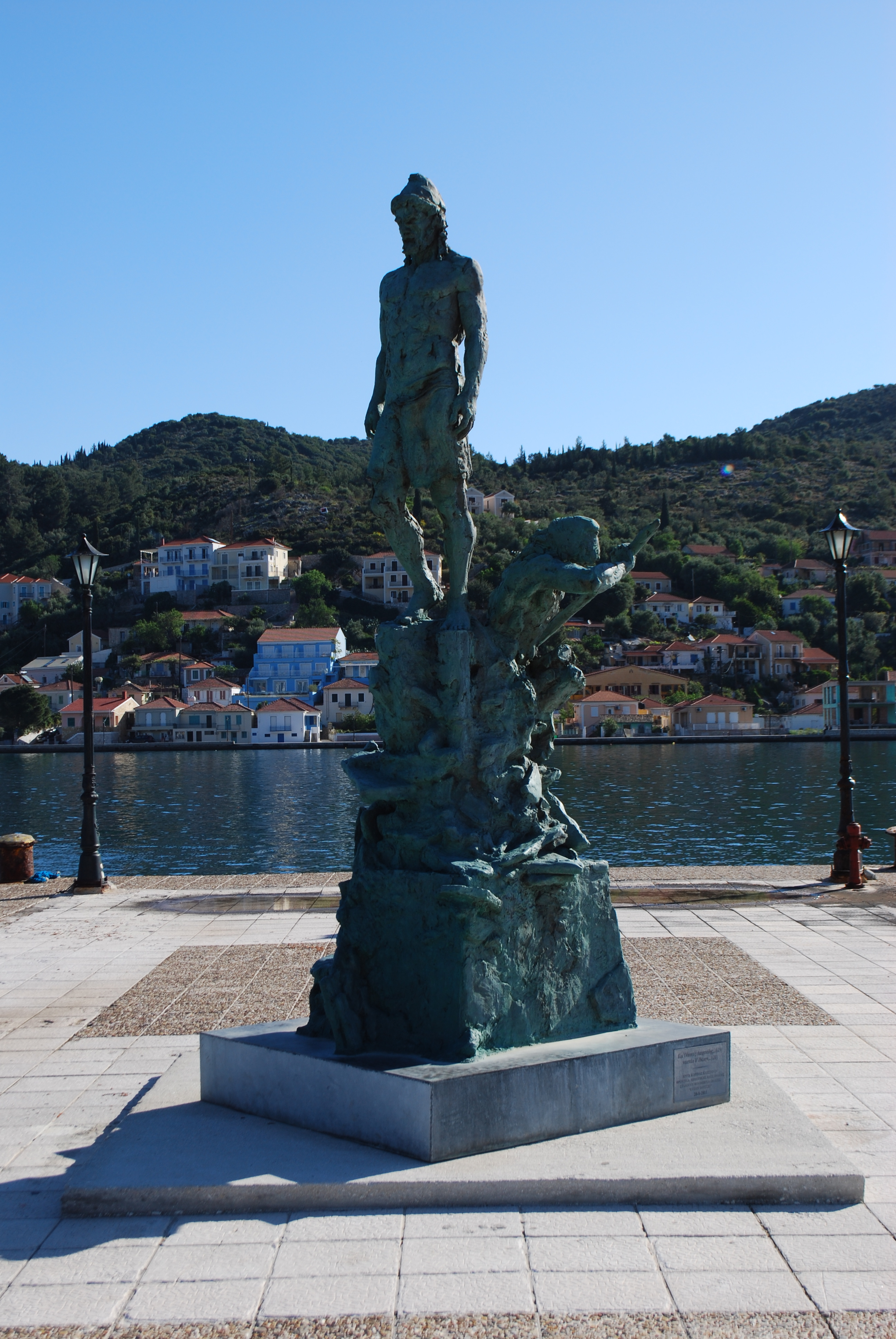 Vue d'Ithaque.